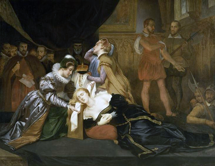 La mort de Marie Stuart, 1587 The execution of Mary, Queen of Scots